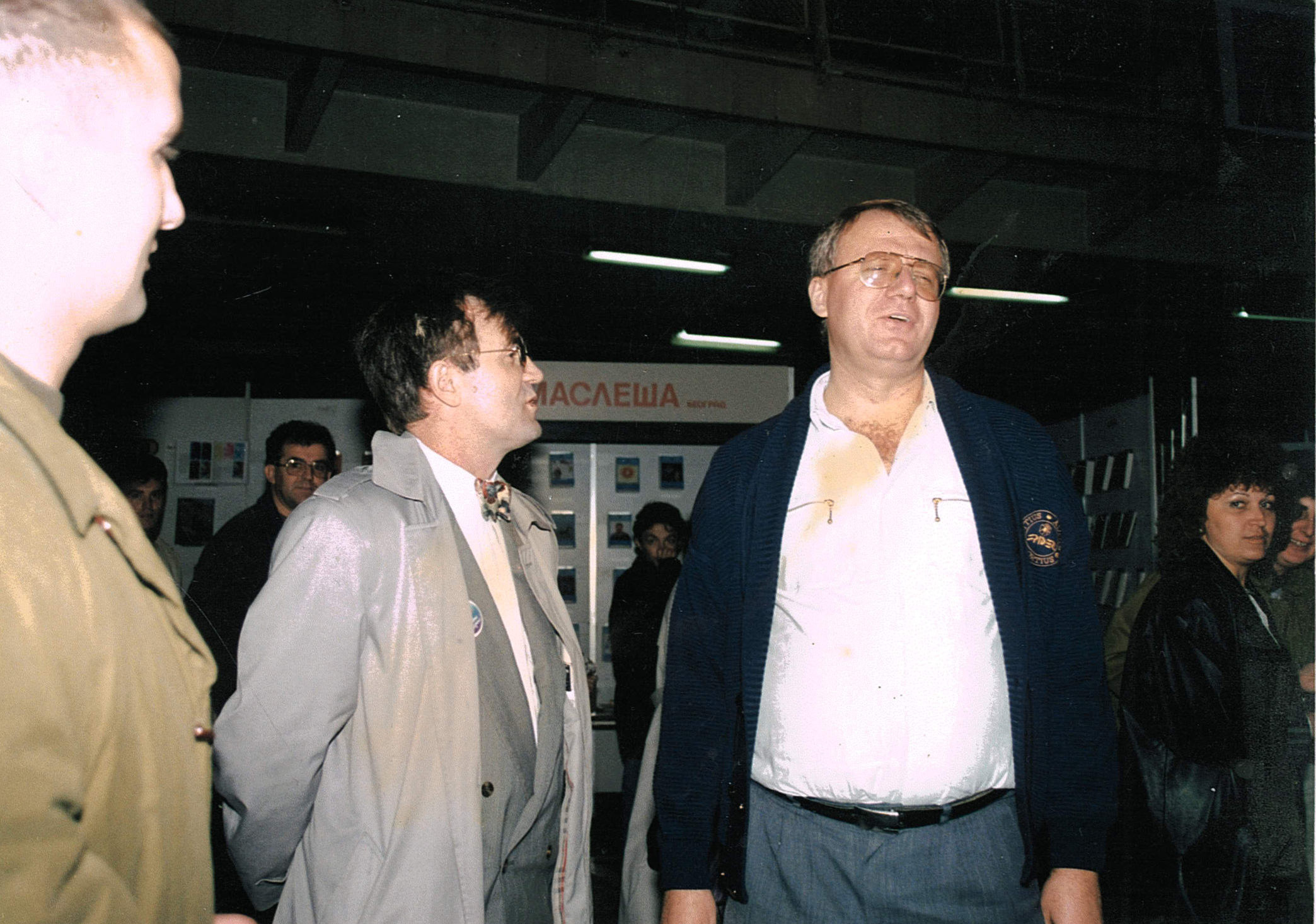 Са Војиславом Шешељем